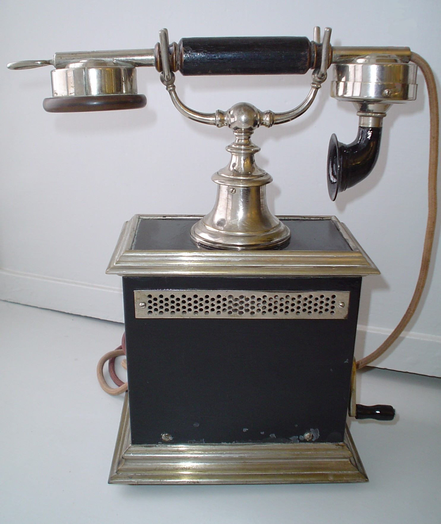 Tabla ŝtalskatola telefono